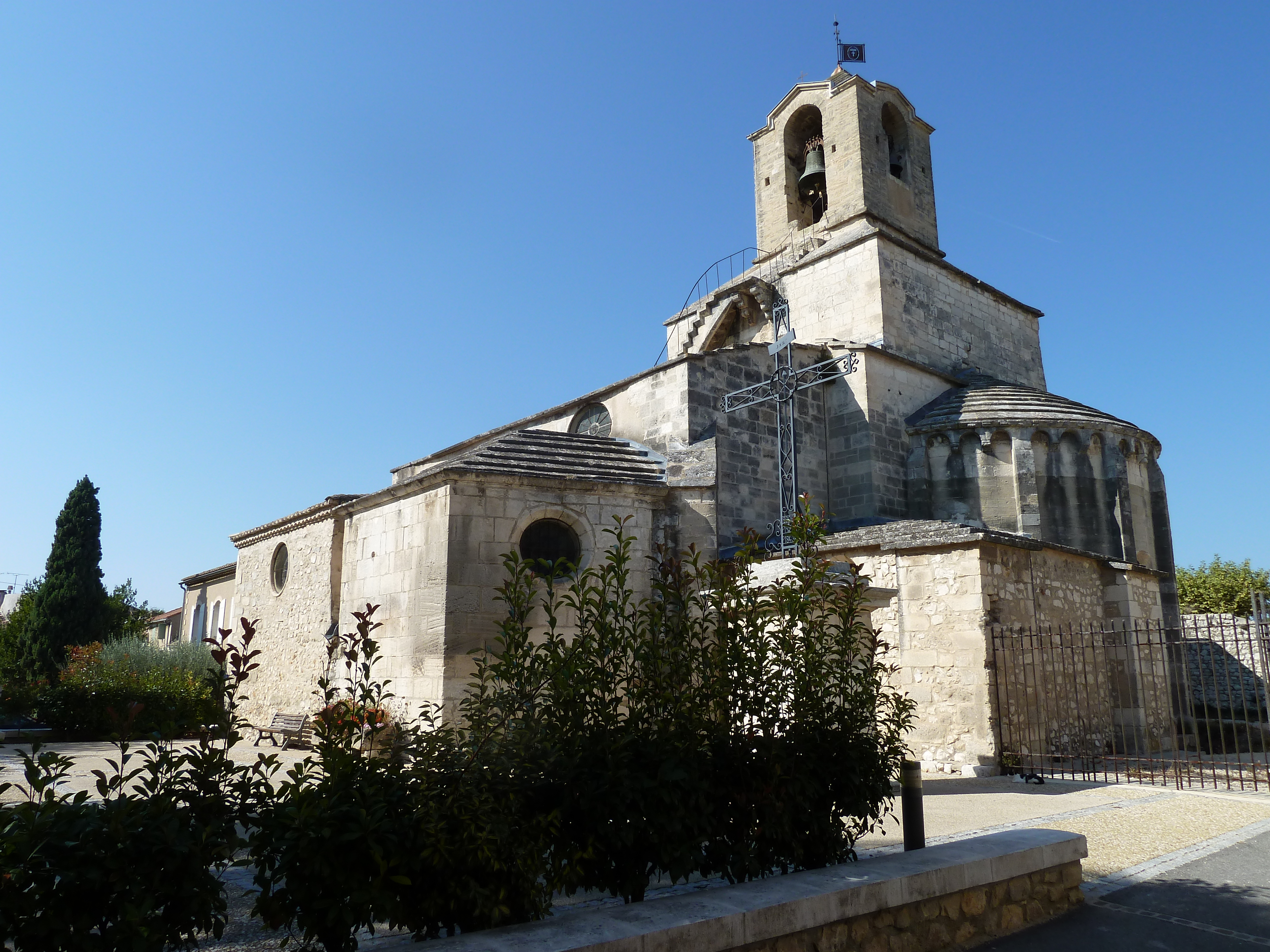 Noves - Église de Saint Beaudile, nef romane du Xème et XII ème siècle, Chapelles du XVème et XXème siècle